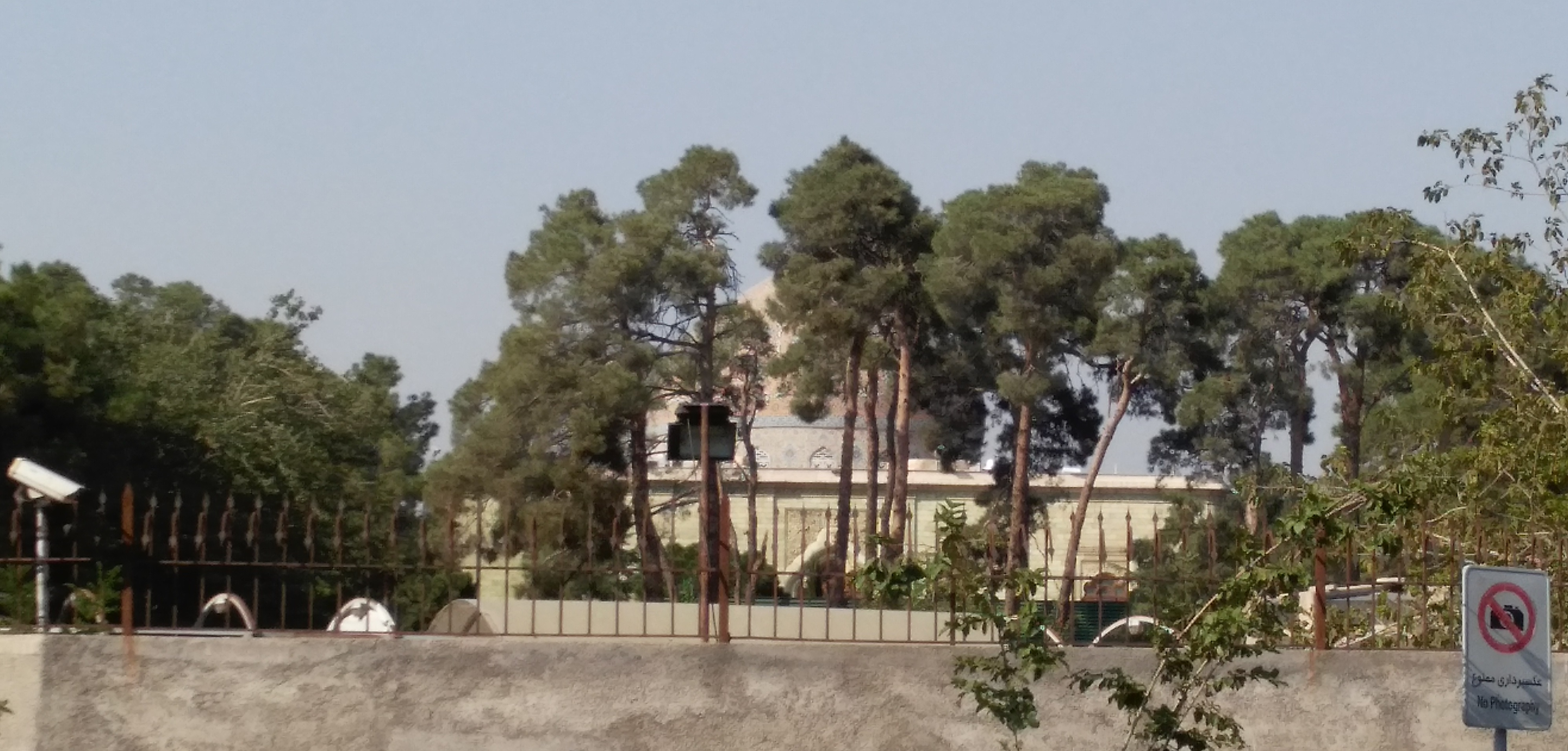 کاخ مرمر